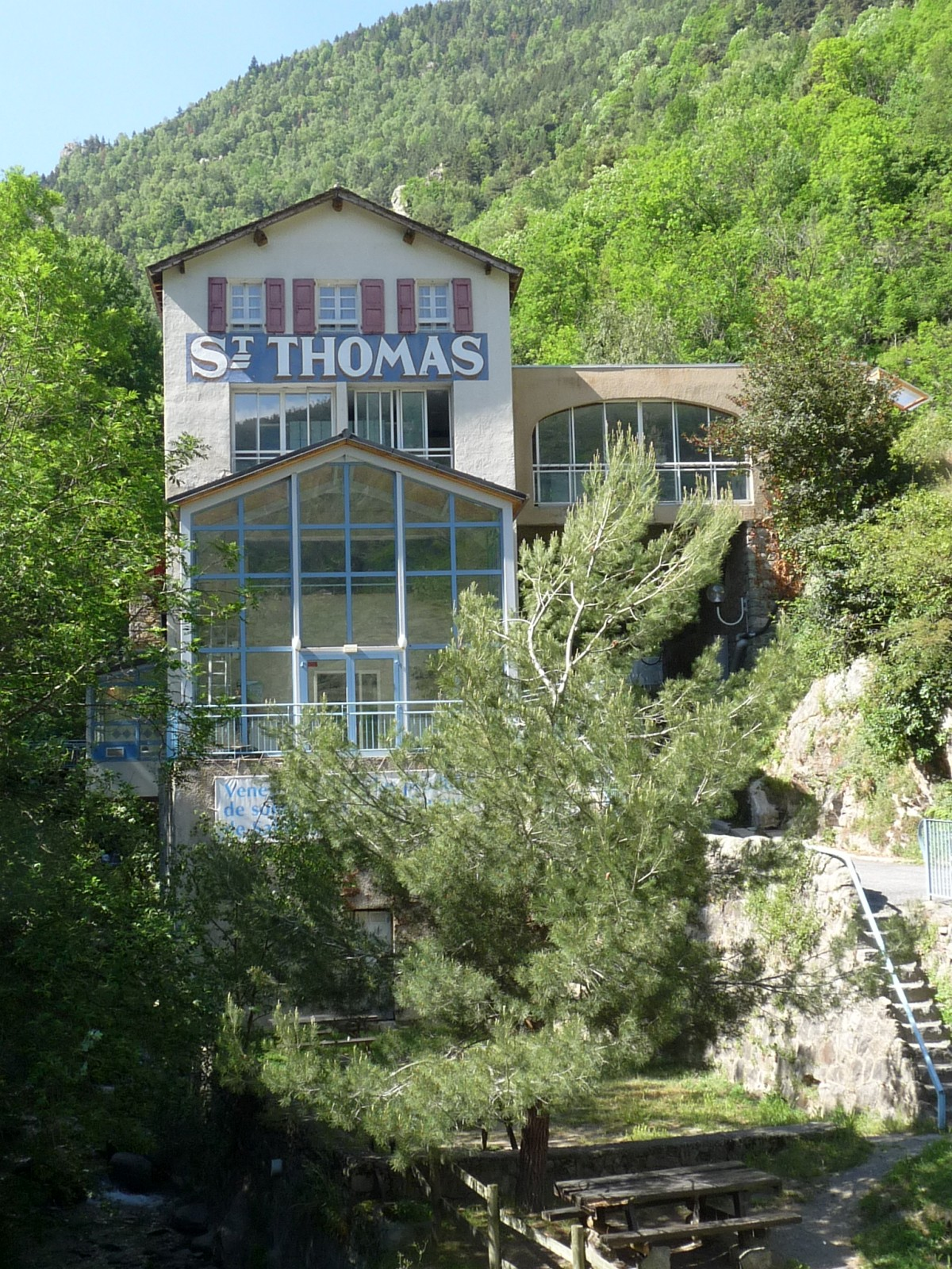 Bains de St-Thomas, Fontpédrouse, Pyrénées-Orientales, France